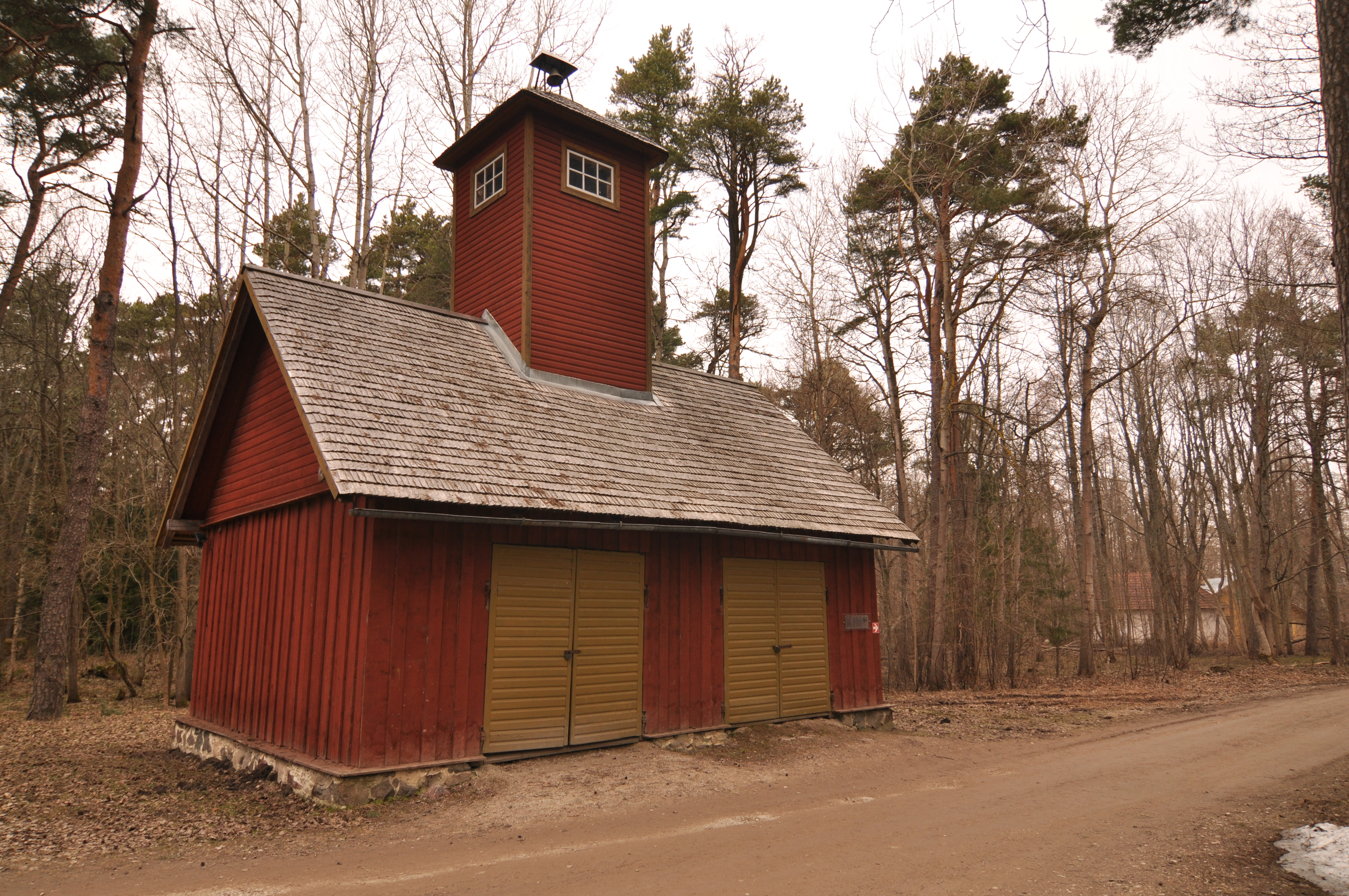 Orgmetsa pritsukuur Eesti Vabaõhumuuseumis.